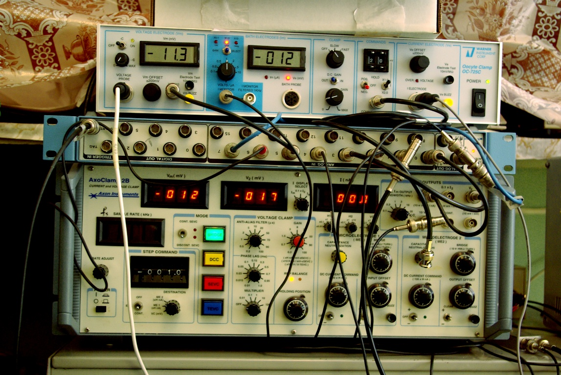 Усилители биопотенциалов и АЦП в составе электрофизиологической установки